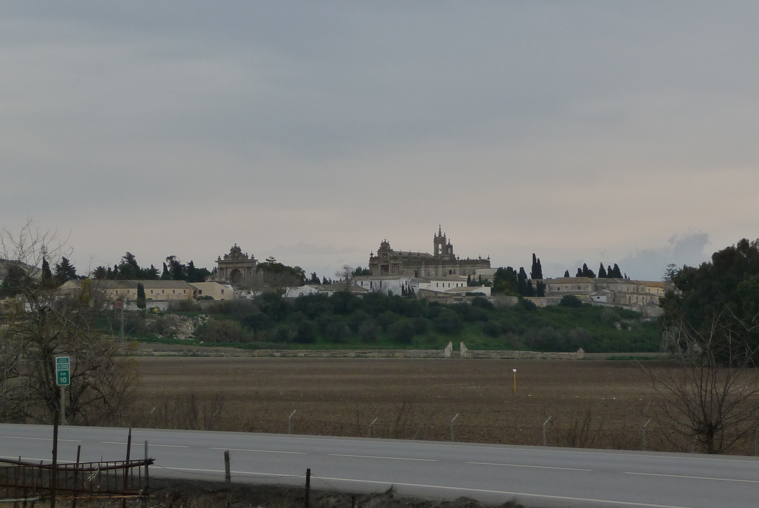 Cartuja of Nuestra Señora de la Defensión. Jerez de la Frontera (Andalusia, Spain)